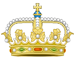 Corona di Langravio in Germania